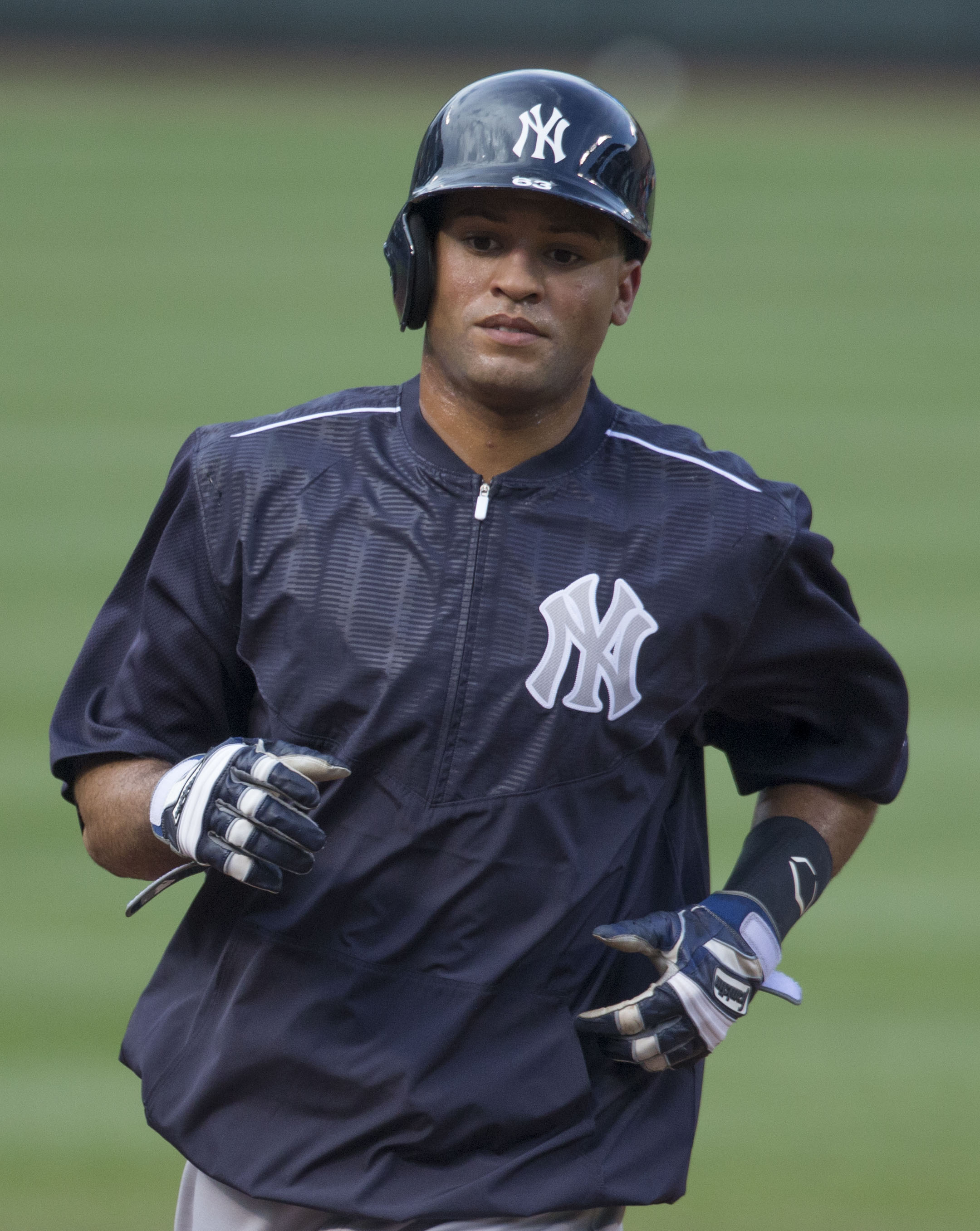 Yankees at Orioles 6/12/15